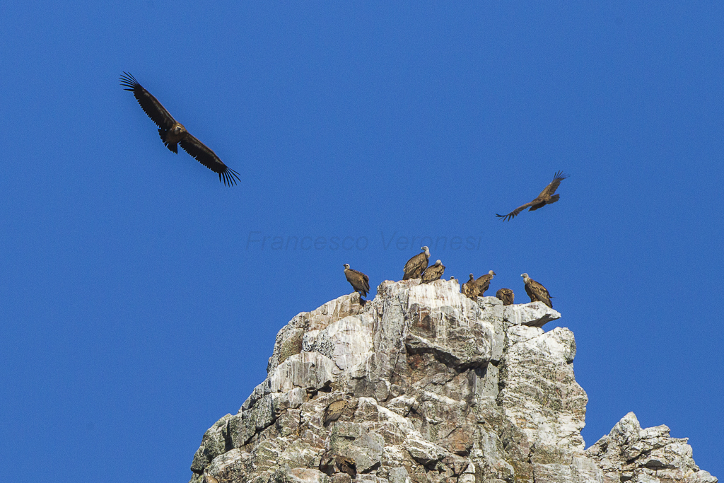 Eurasian Griffons at Penafalcon top - Monfrague - Estremadura_S4E6556